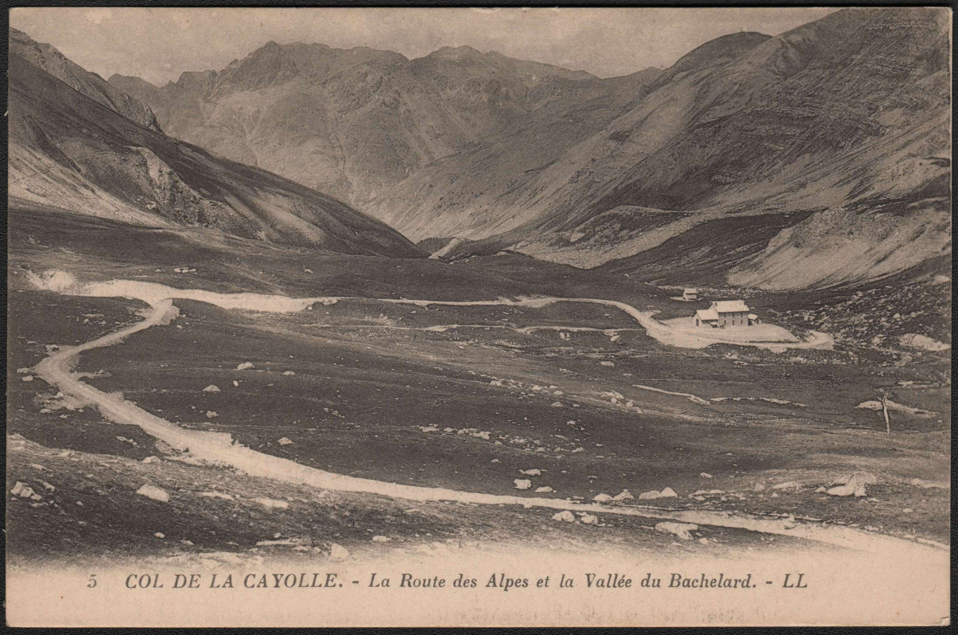 La route des Alpes et la Valée du Bachelard. - LL Levy et Neurdein Reunis